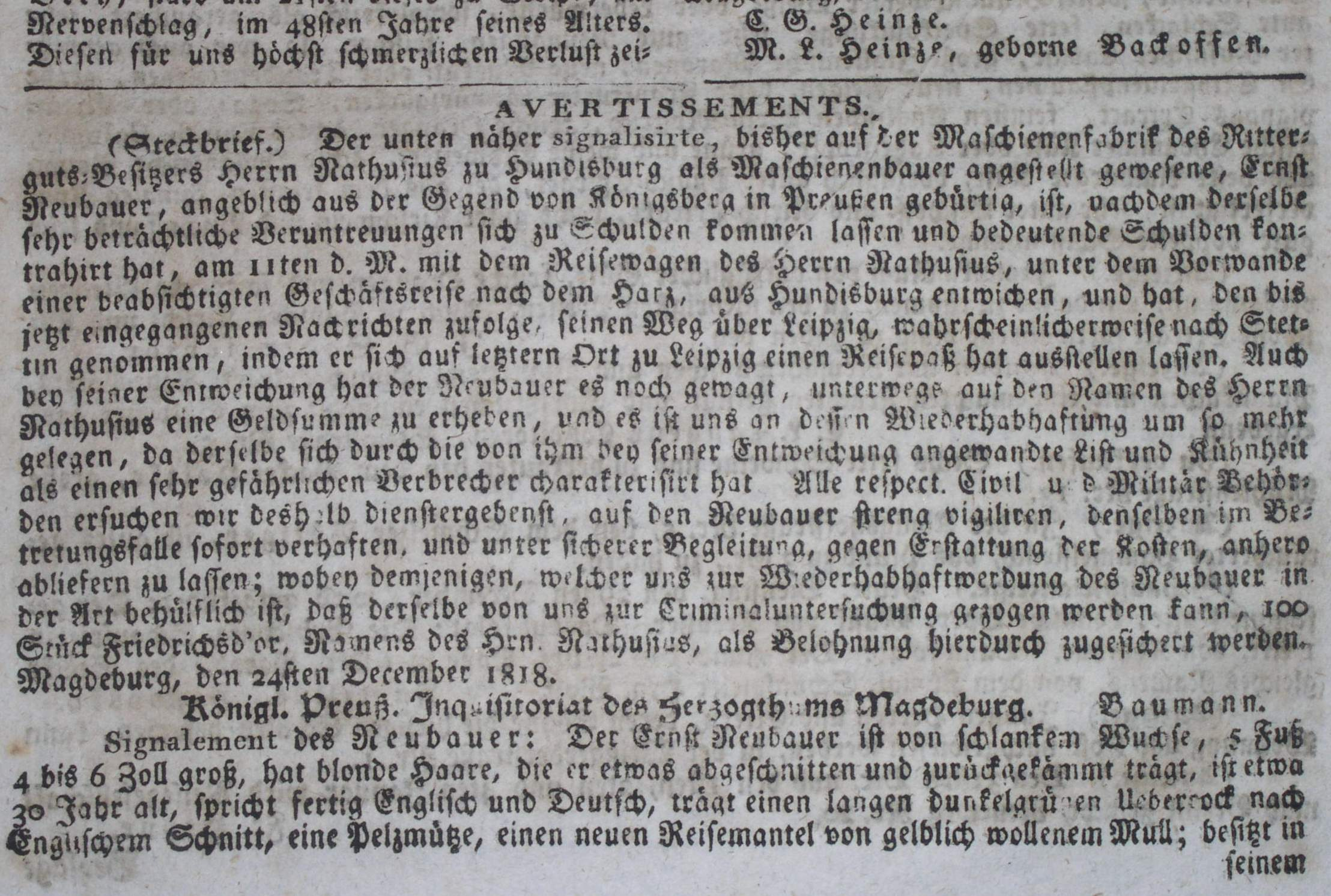 Steckbrief in Magdeburger Zeitung